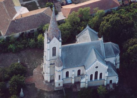 Szelevény, Hungary, aerialphotography